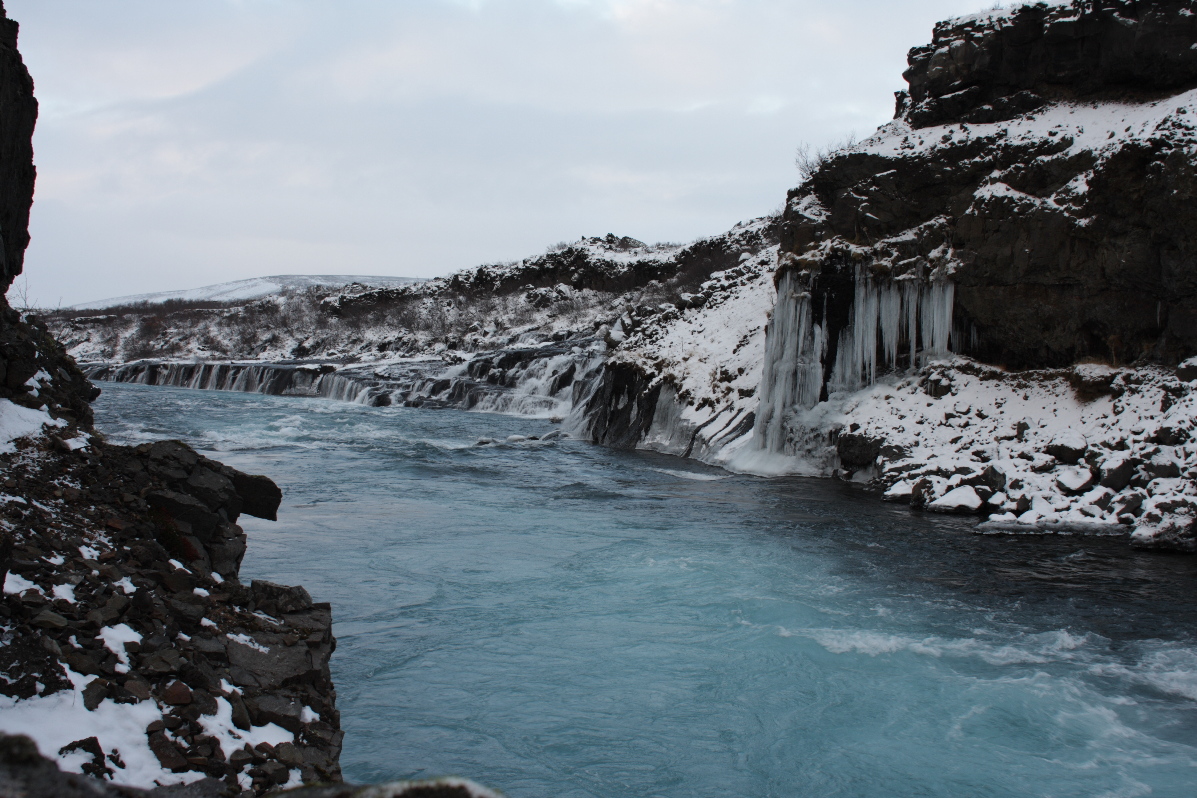 Hraunfossar im Winter